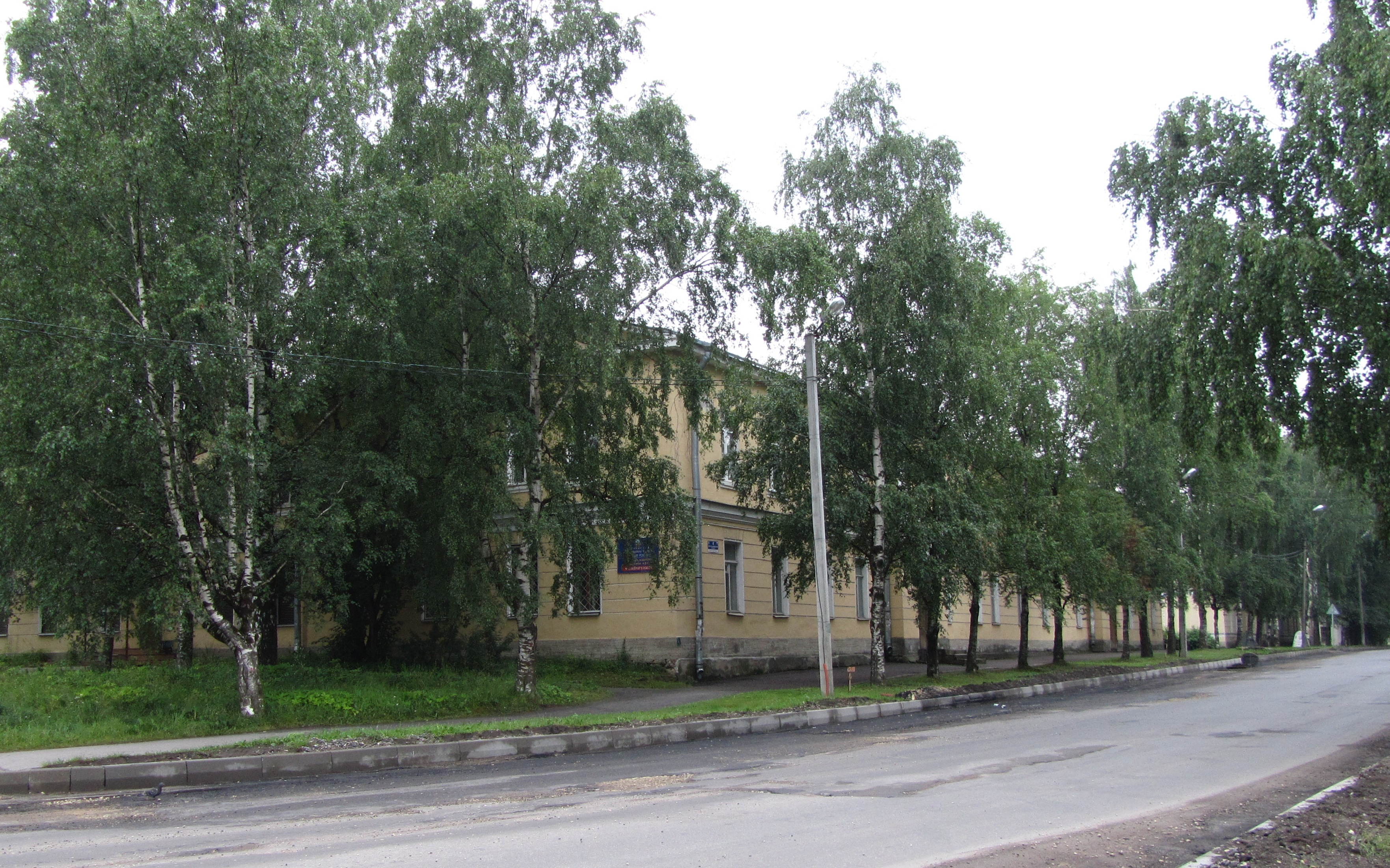 Жилой дом Чкалова